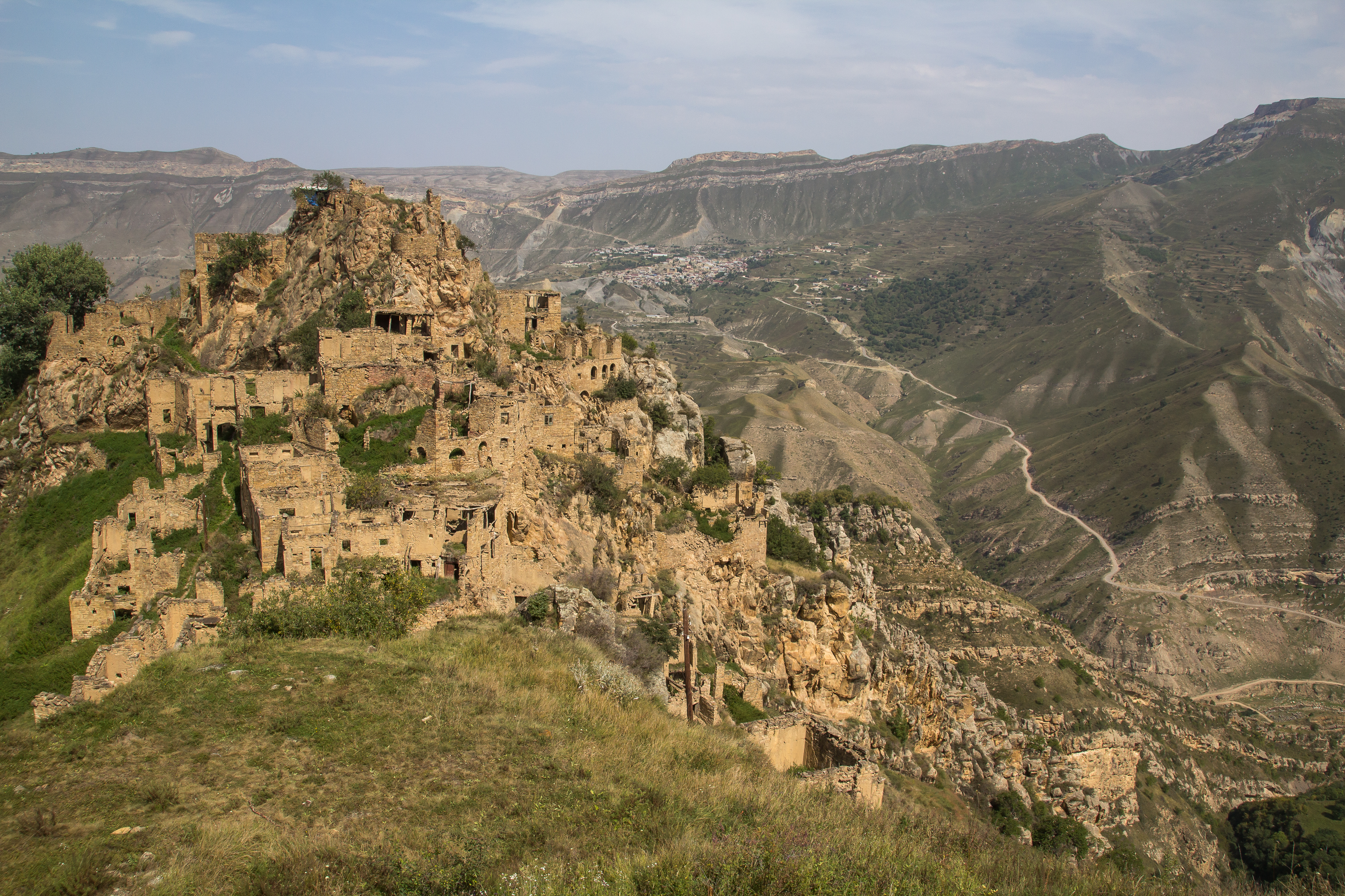 село Гамсутль Гунибский район, Республика Дагестан, Россия